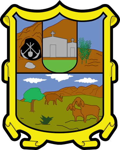 Escudo de Armas de San Nicolas Tamaulipas